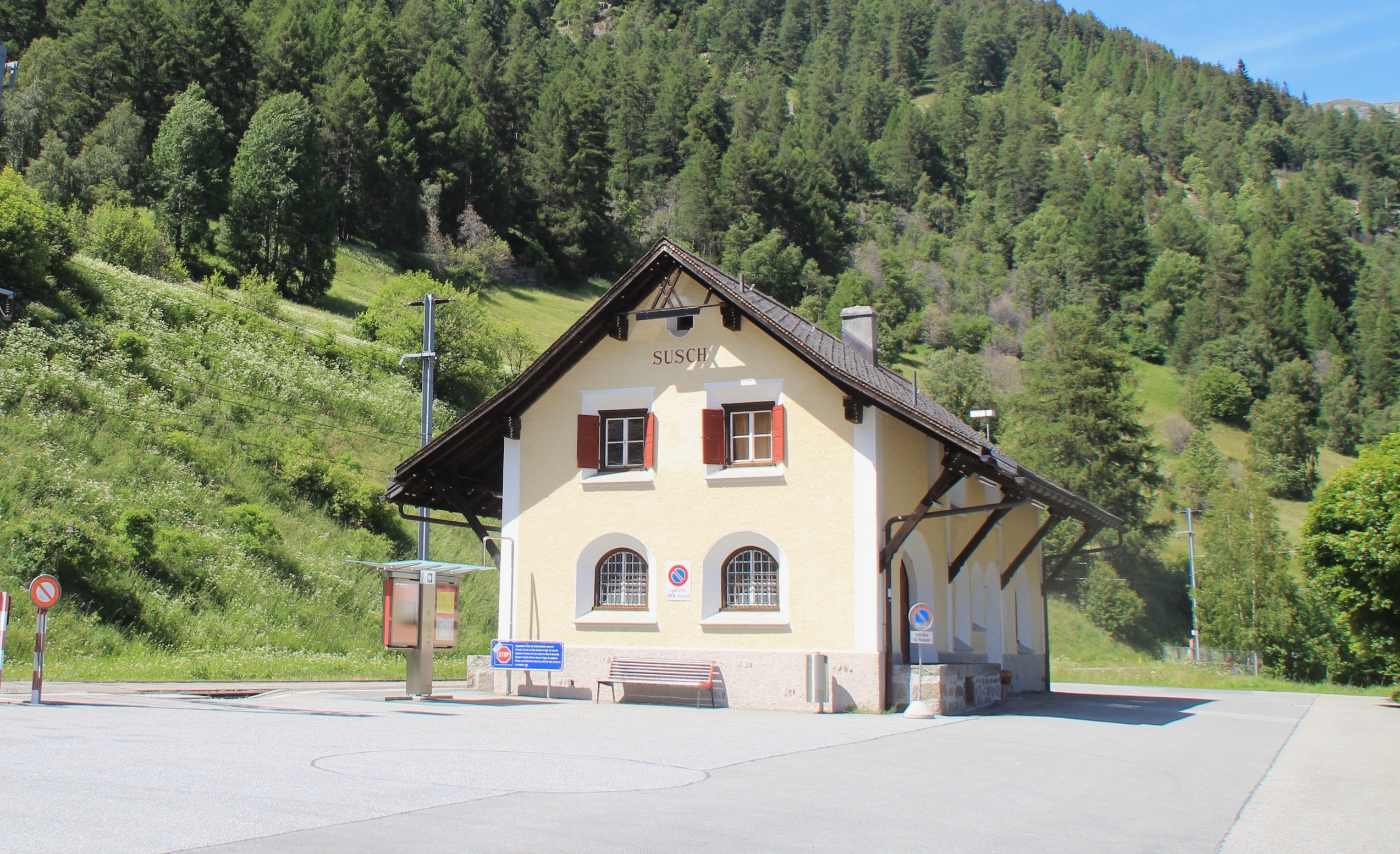 Susch Bahnhof